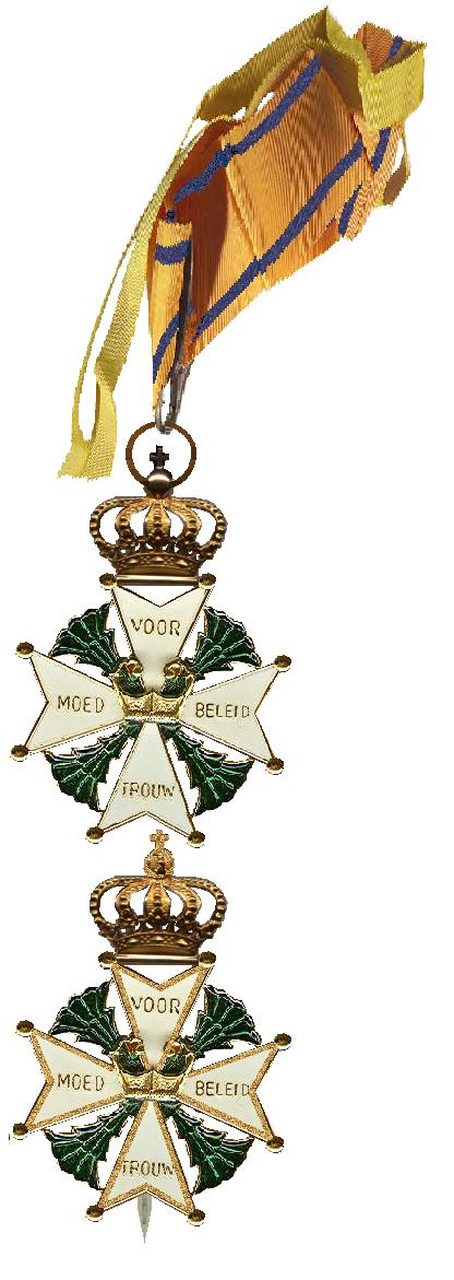 Scan van een kruis in mijn verzameling, bewerkt met paint en het lint is een eigen tekening